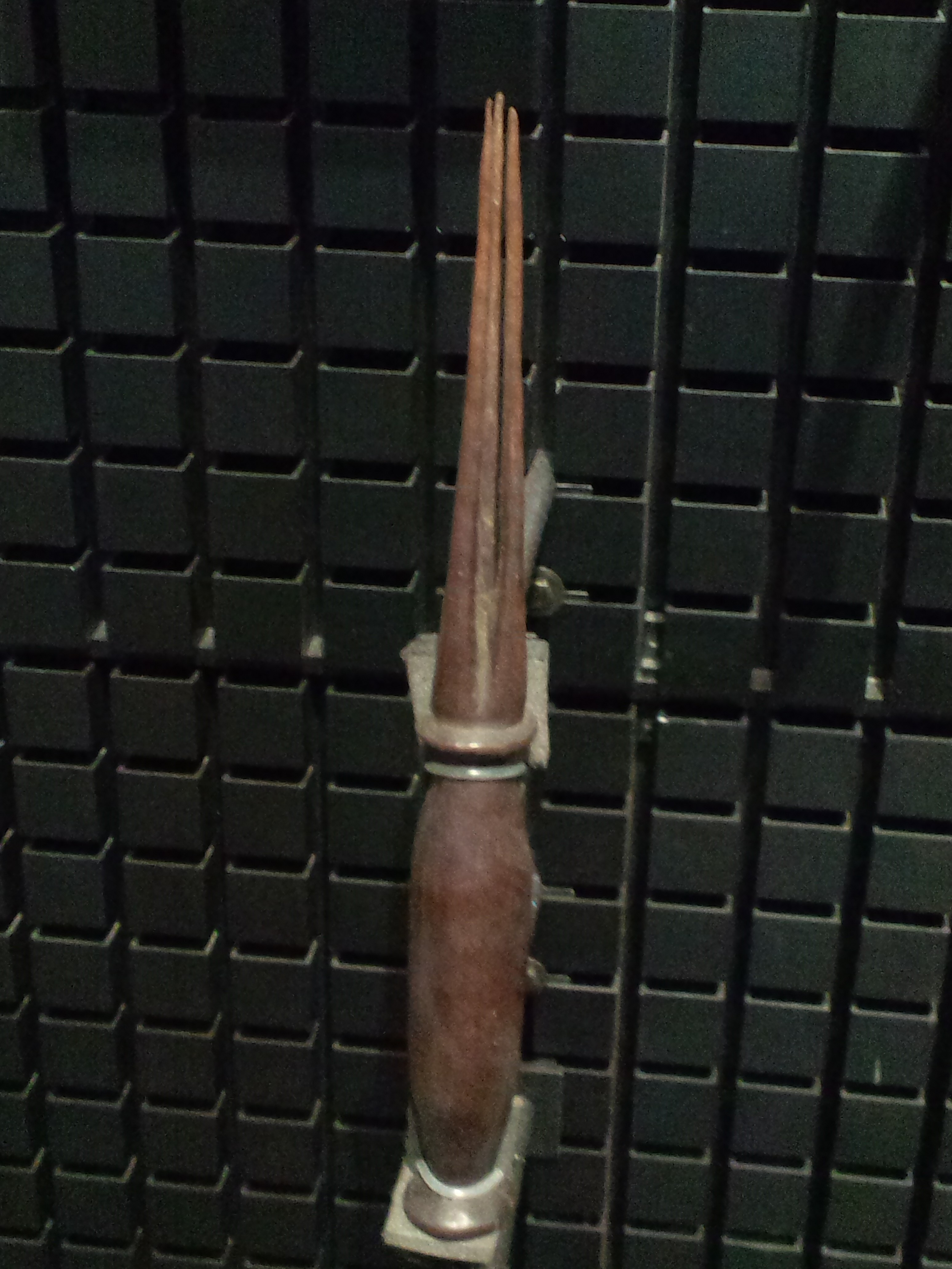 国立民族学博物館（大阪） 人肉食用フォーク（フィジー諸島、19世紀後半製作、ジョージ・ブラウン・コレクション）